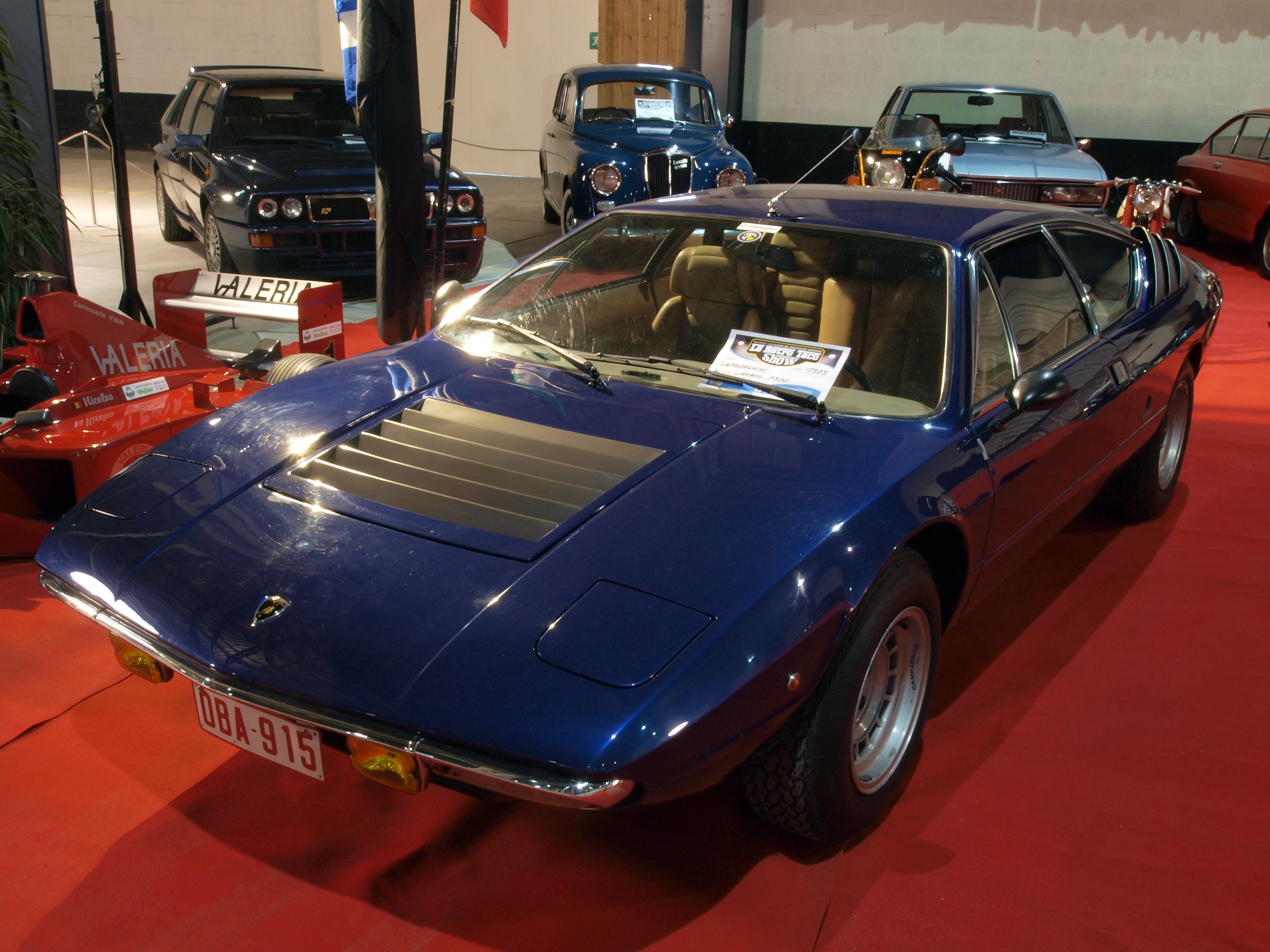 Lambougini Urarco P300 (1975)